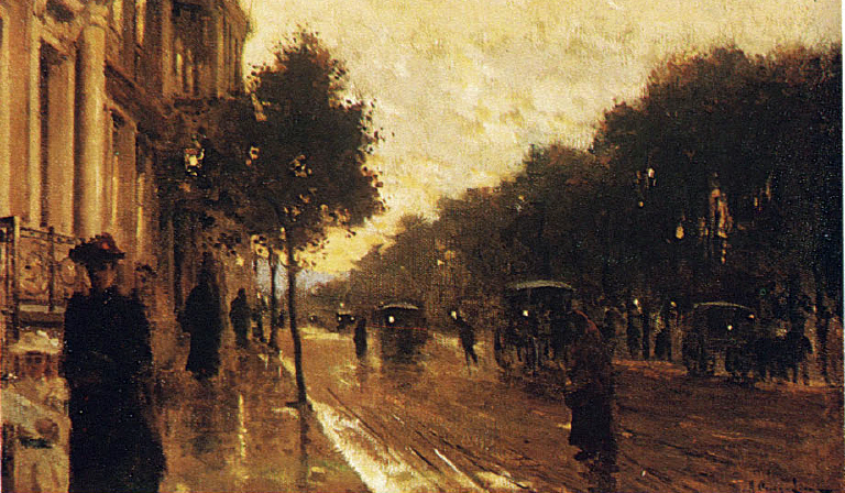 "Alameda de las Delicias" por Alberto Orrego Luco (1854 - 1931)